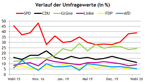 Umfragen zur Hamburg-Wahl 2020